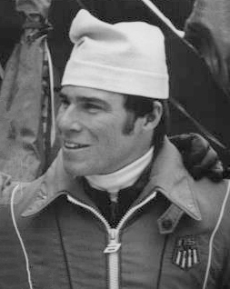 1976 Press Photo Willi Puerstl, Hans Georg Aschenbach & Jerry Martin on Iron Mt.